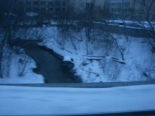 Niŝĉenka (rivereto oriente de Moskvo)